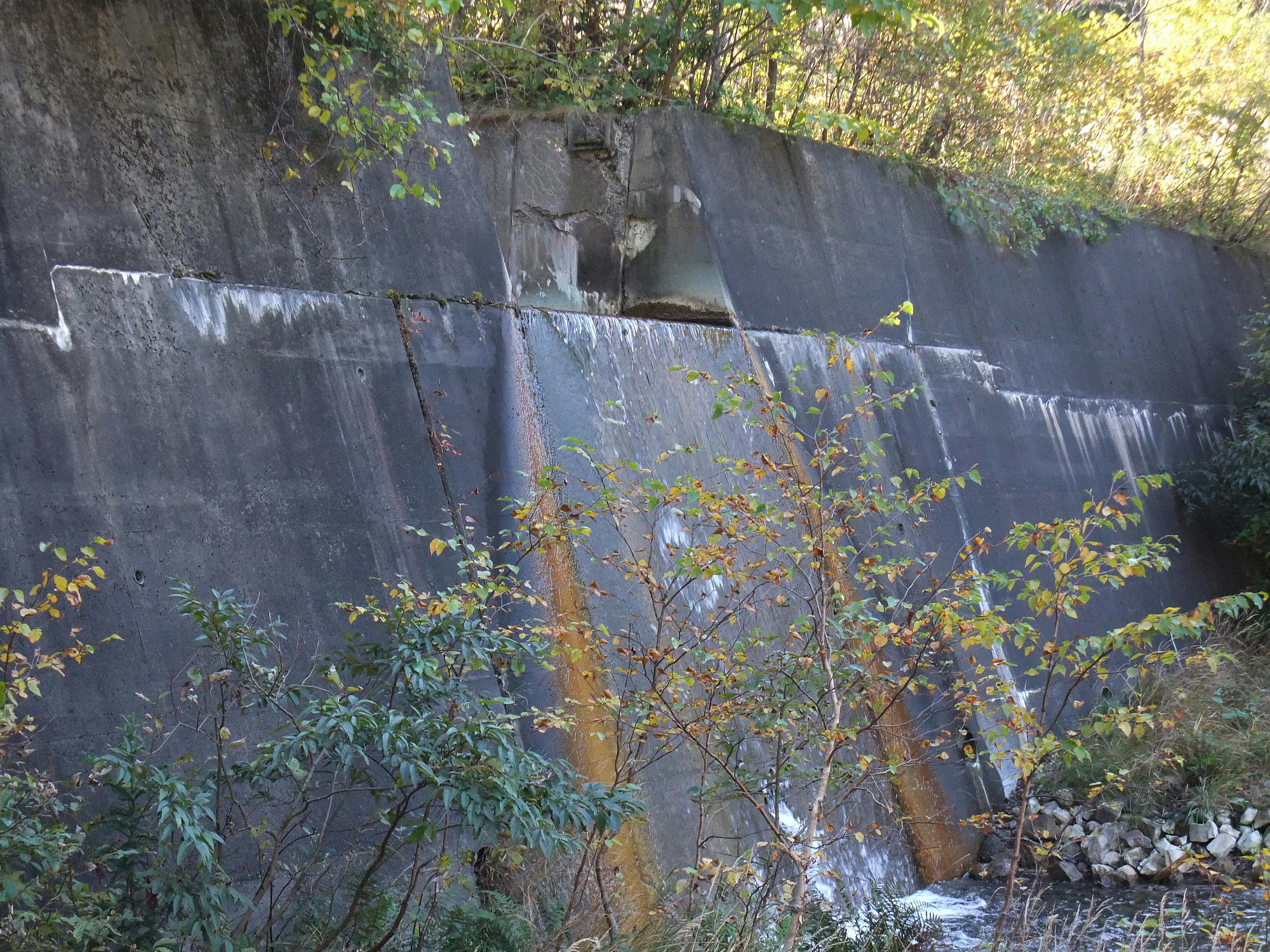 不老倉鉱山跡ダム